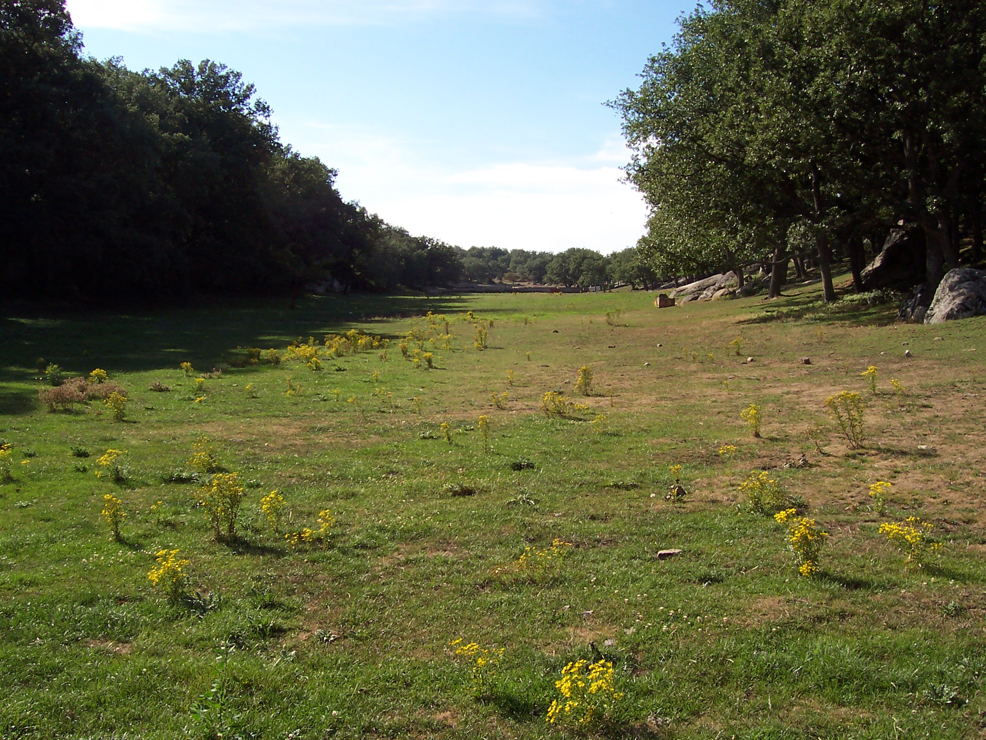 Cañada Honda de Valonsadero